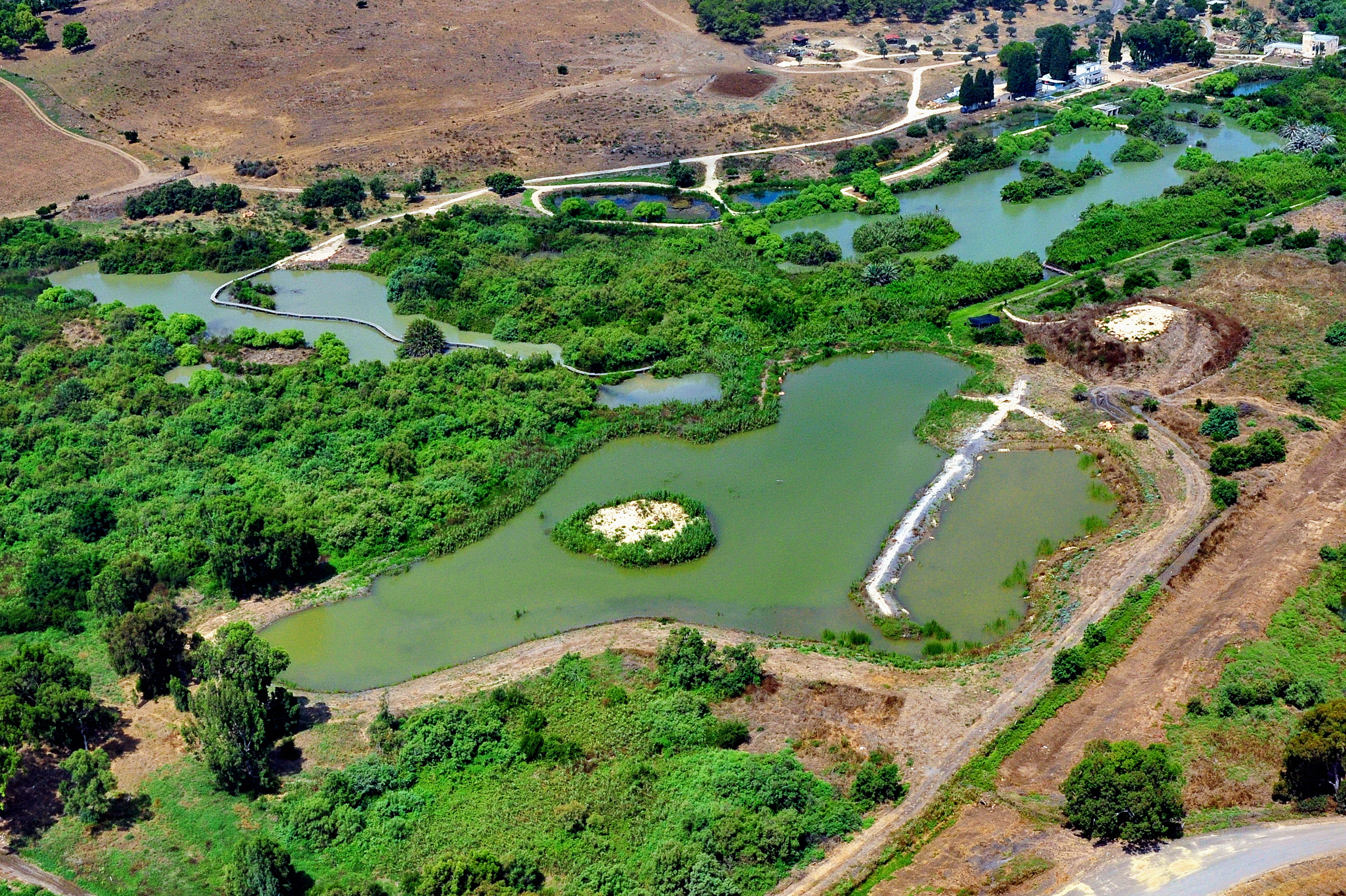 שמורת טבע בעמק זבולון, מזרחית לקריית ביאליק. השמורה כוללת הן את המעיינות והביצות המהווים את מקורו של נחל נעמן והן את האתר הארכאולוגי תל אפק. השמורה הוכרזה ב-1979 והיא משתרעת על פני 660 דונם. ב-1996 הוכרה השמורה כ"אתר רמסר" בהתאם לאמנת רמסר לשימור ולפיתוח בר-קיימא של בתי גידול לחים.